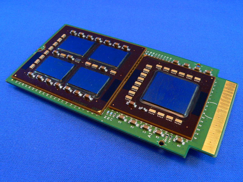 Itanium cpu照片